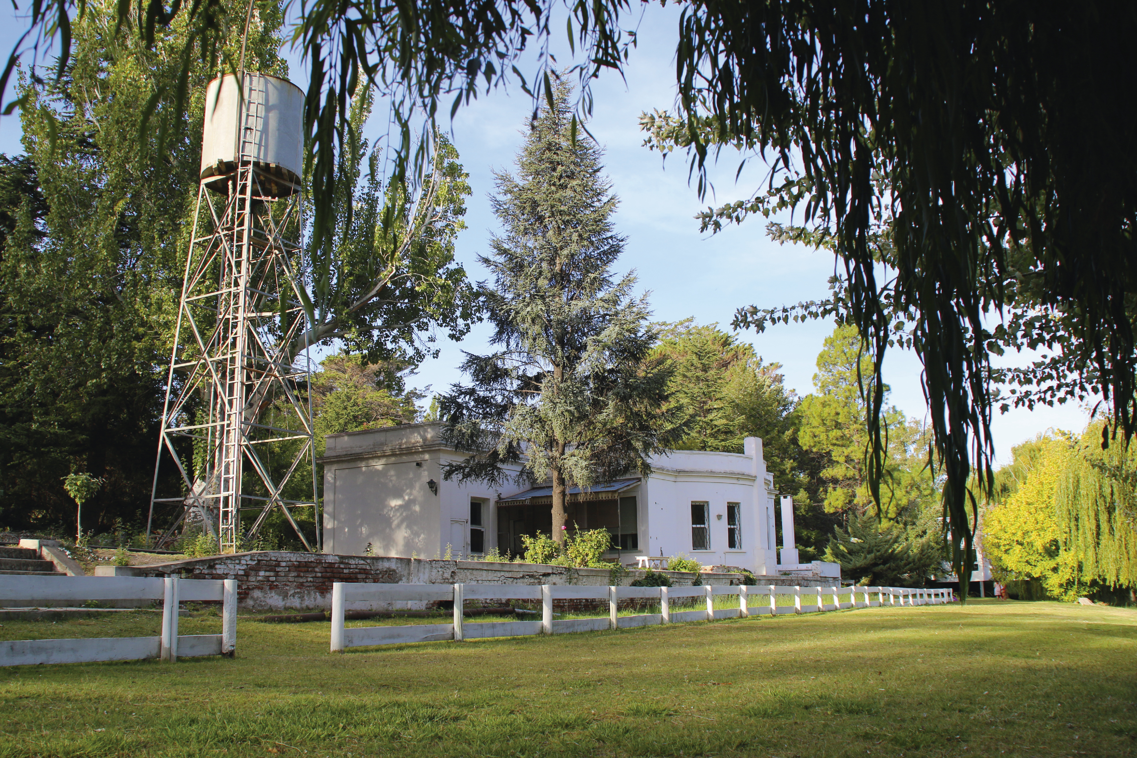 Imagen tomada por Zoé Fernandez, vecina de la ciudad de Plottier.